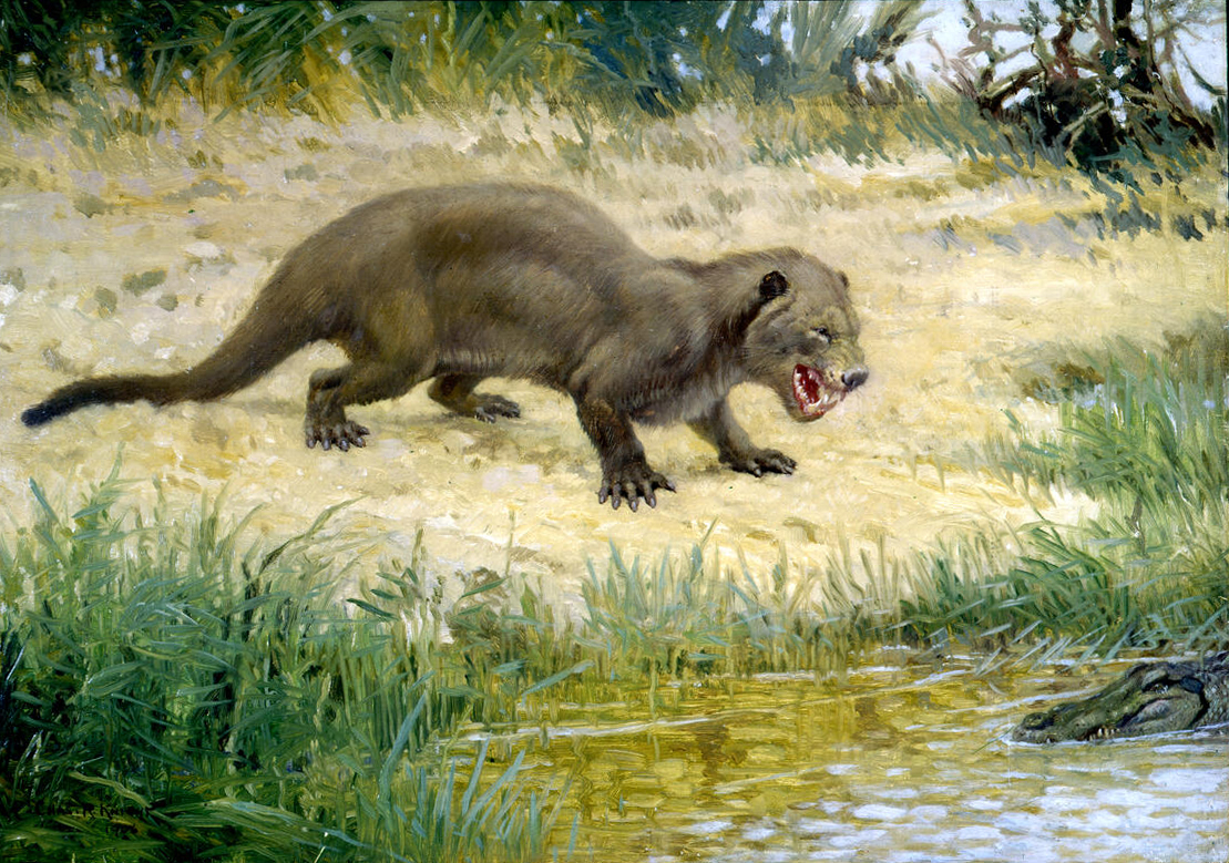 Patrioelis ferox.